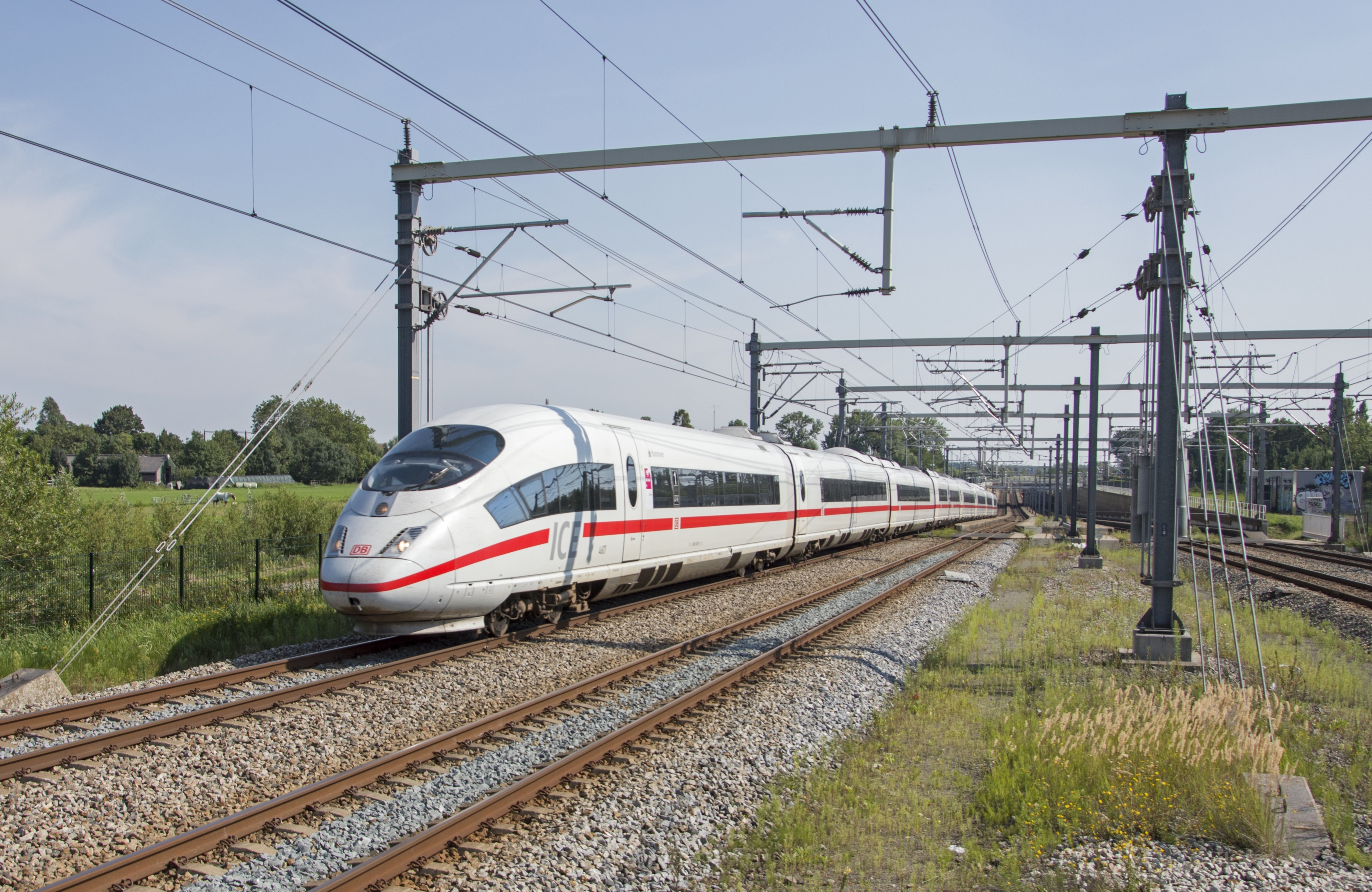 Bij Abcoude komt ICE3m 4607 als omgeleide ICE 156 naar Amsterdam uit het aquaduct door.